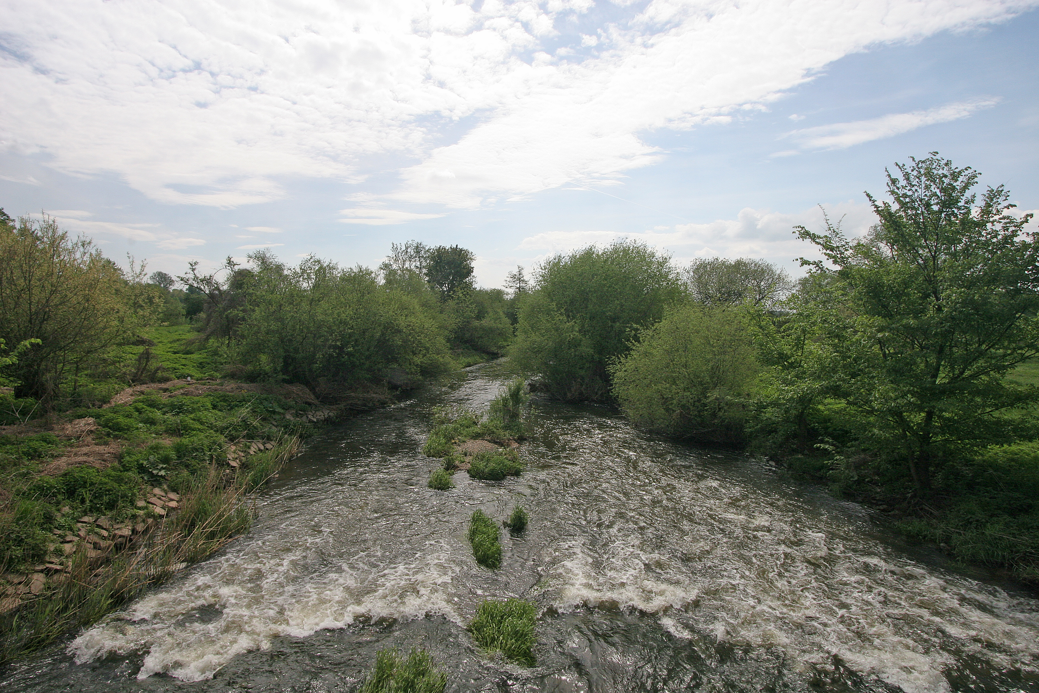 Cidlina z mostu u Pamětníku